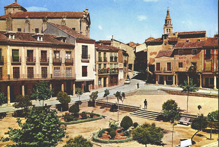 Plaza Mayor - Medina de Rioseco (Valladolid) - García GARRABELLA y Cía - Zaragoza - 5 - Medina de Rioseco. 5. Plaza Mayor de Medina de Rioseco. - Fotografía 185 x 103 Color